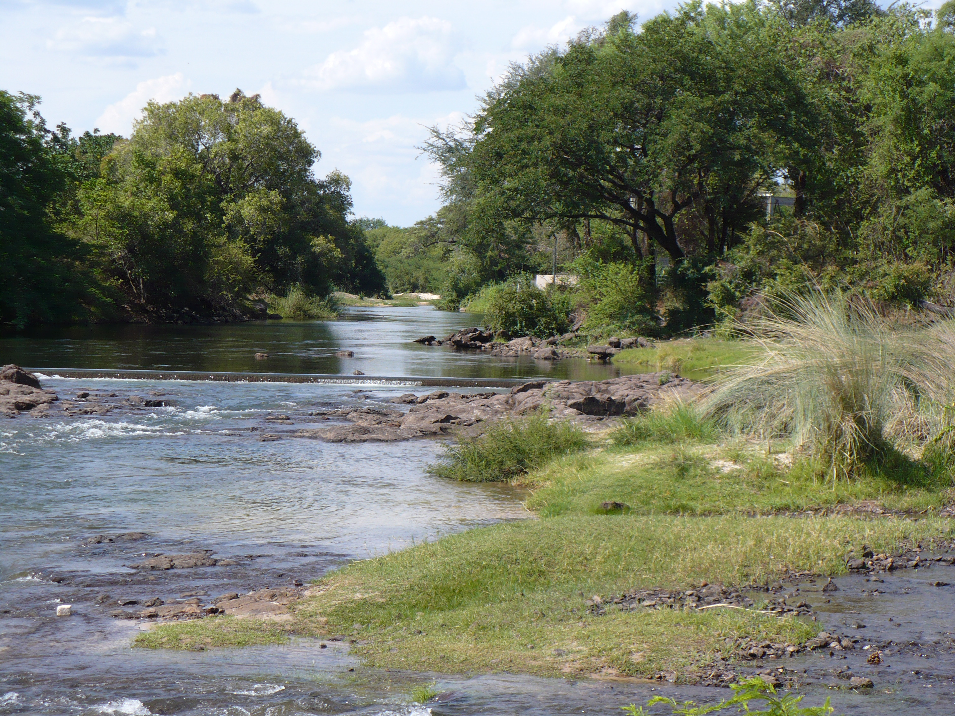 Landscape, Zambia